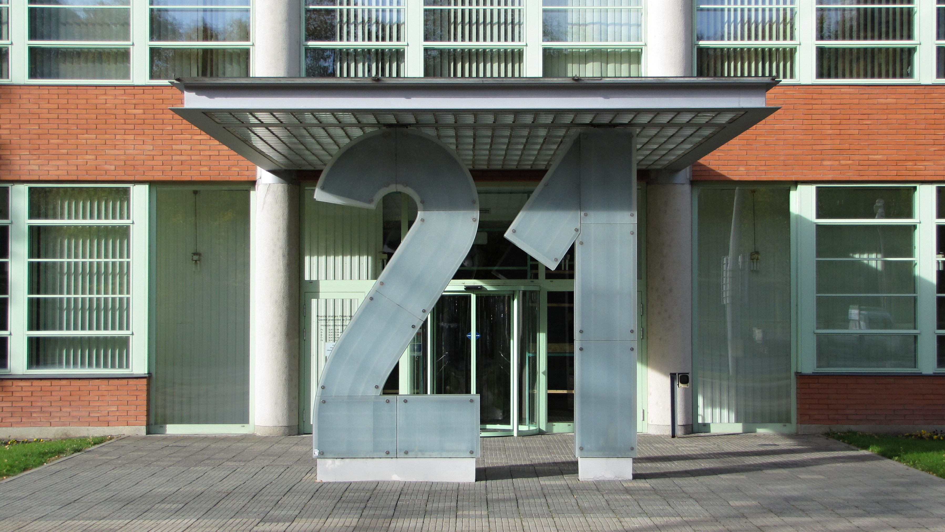 Hlavní vstup do Baťova mrakodrapu